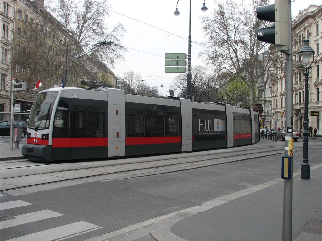 ULF na Ringu